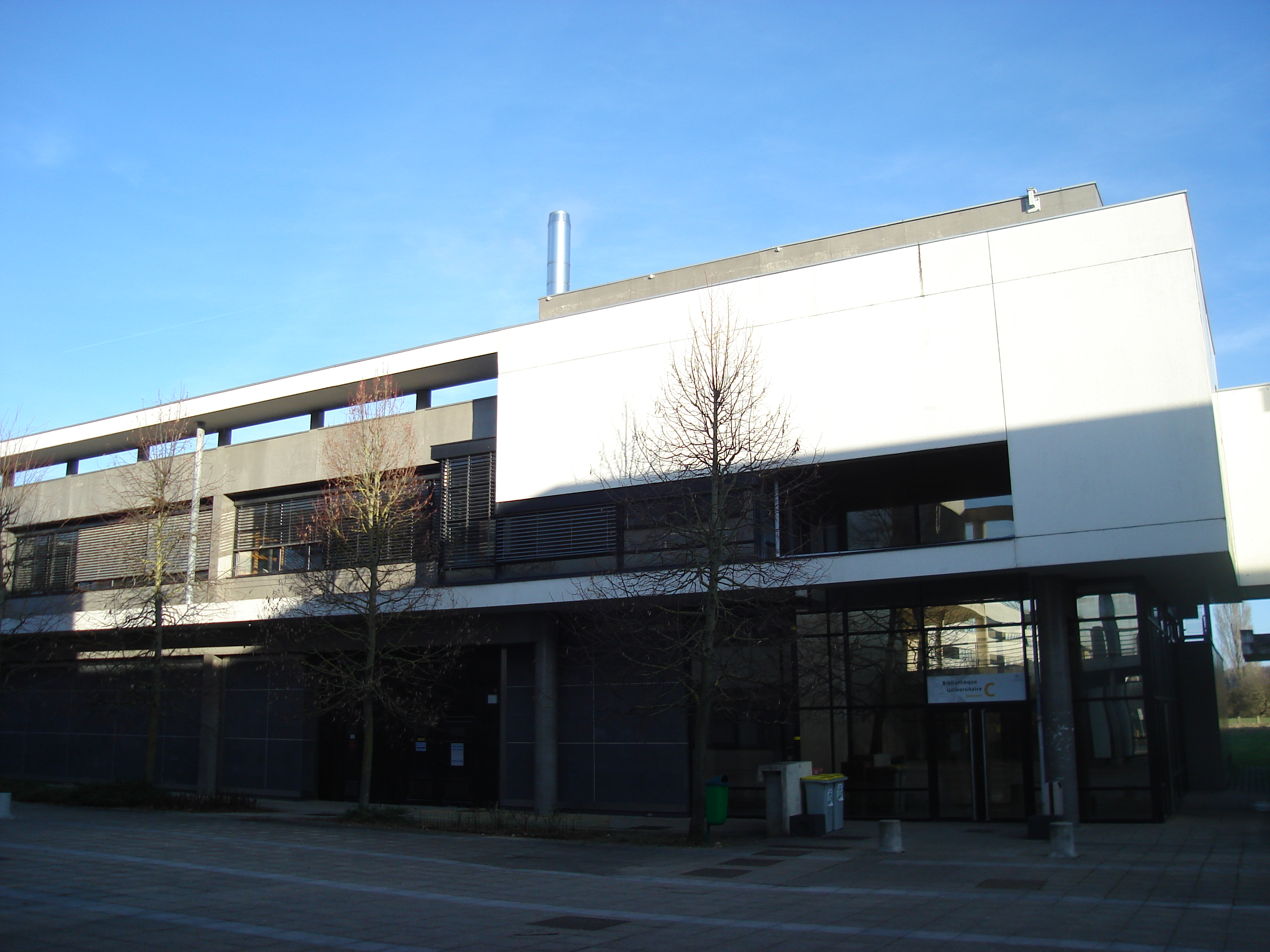 Bibliothèque universitaire de la Faculté de droit, d'économie et des sciences sociales de Tours, sur le campus des Deux-Lions